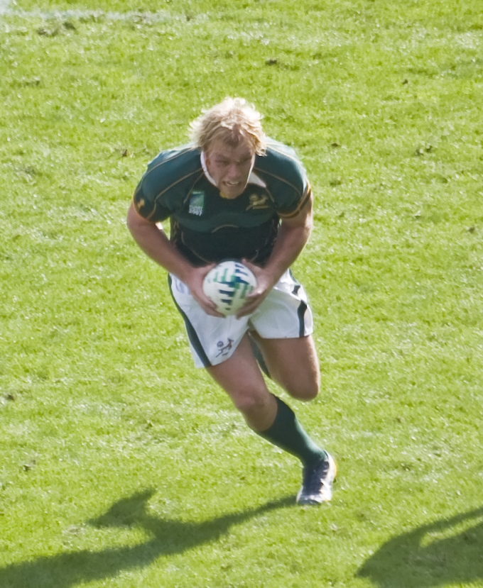 Schalk Burger laat loop met die bal tydens 'n wedstryd teen Samoa tydens die 2007-Rugbywêreldbeker.